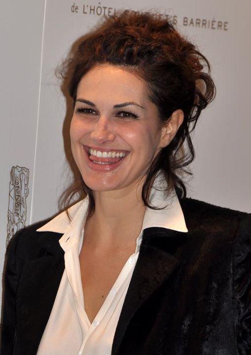 Helena Noguerra à la cérémonie des César